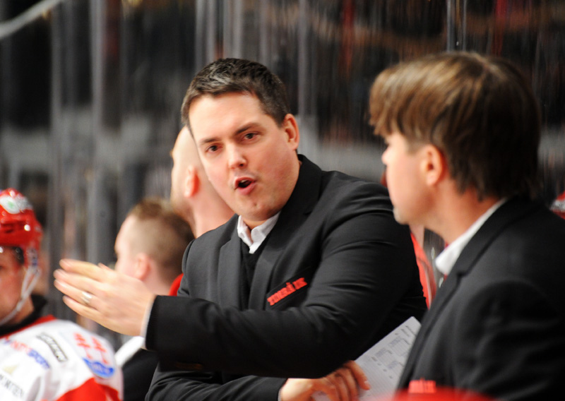 Tomas Montén under en match 2012